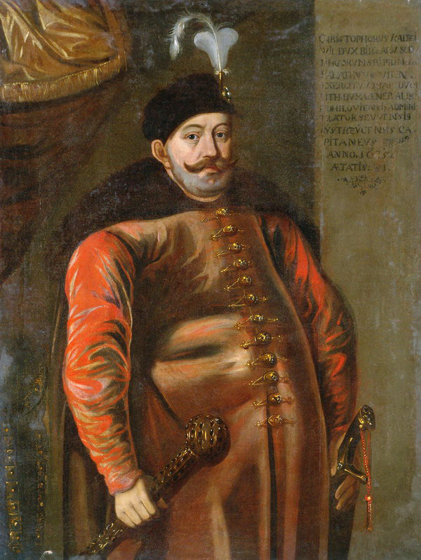 Беларуская (тарашкевіца): Партрэт Крыштапа Радзівіла (Kryštap Radzivił)